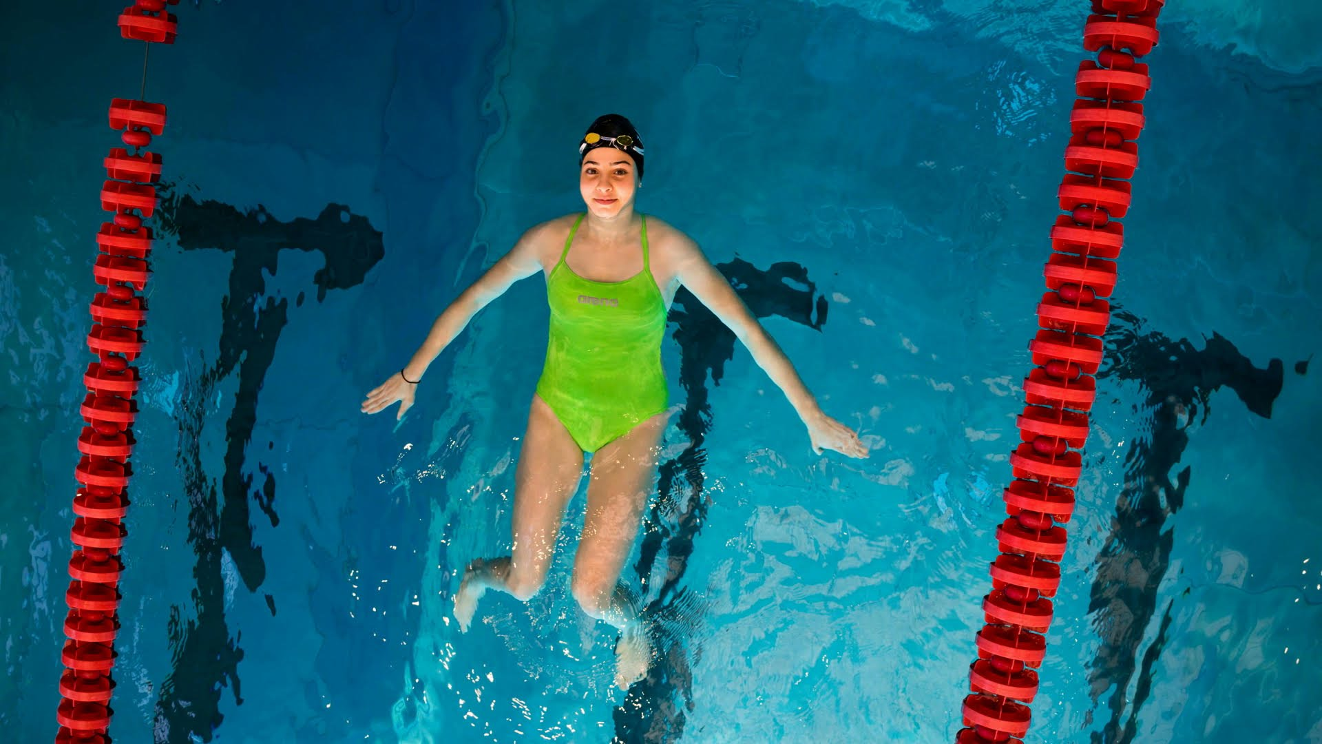 Photographie de Yusra Mardini